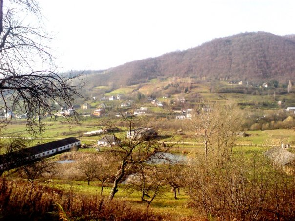 село